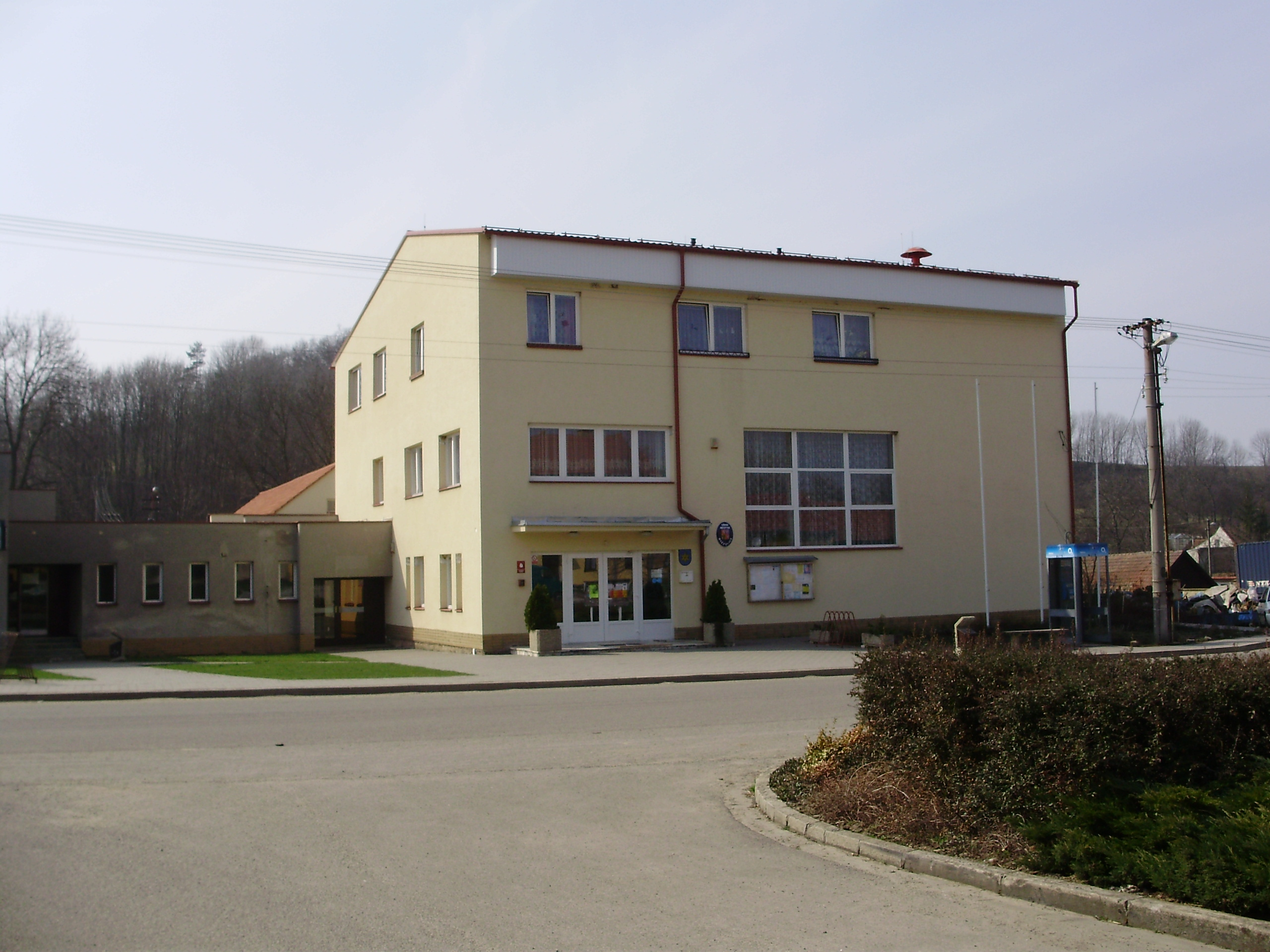 Úřad městyse Hvězdlice